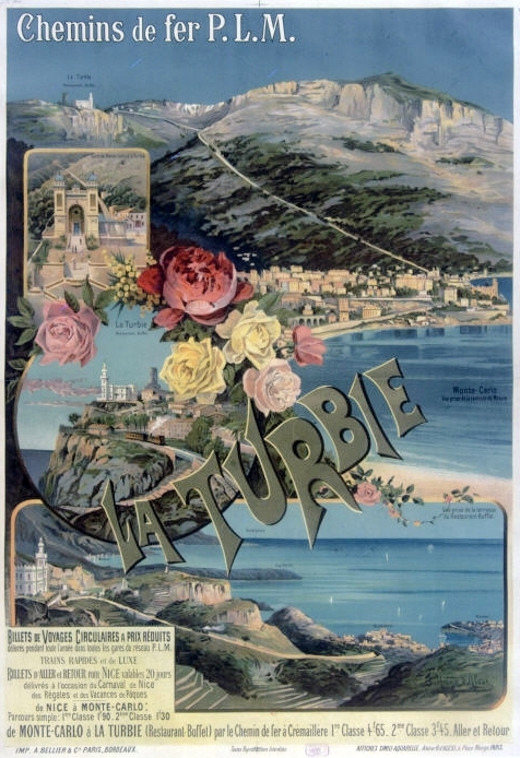 La Turbie. PLM (Compagnie des chemins de fer de Paris à Lyon et à la Méditerranée), affiche de F. Hugo d'Alési, atelier H. d'Alési, 4, place Monge, Paris